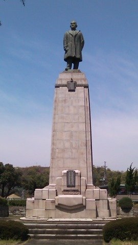 根津嘉一郎像